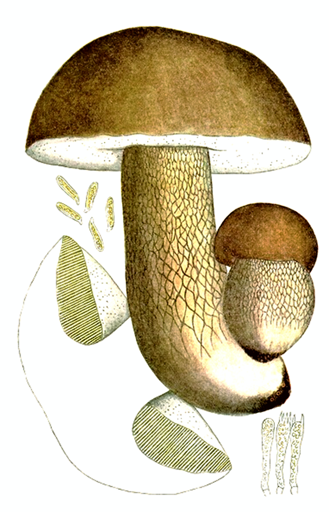 Giacomo Bresadola: Boletus edulis